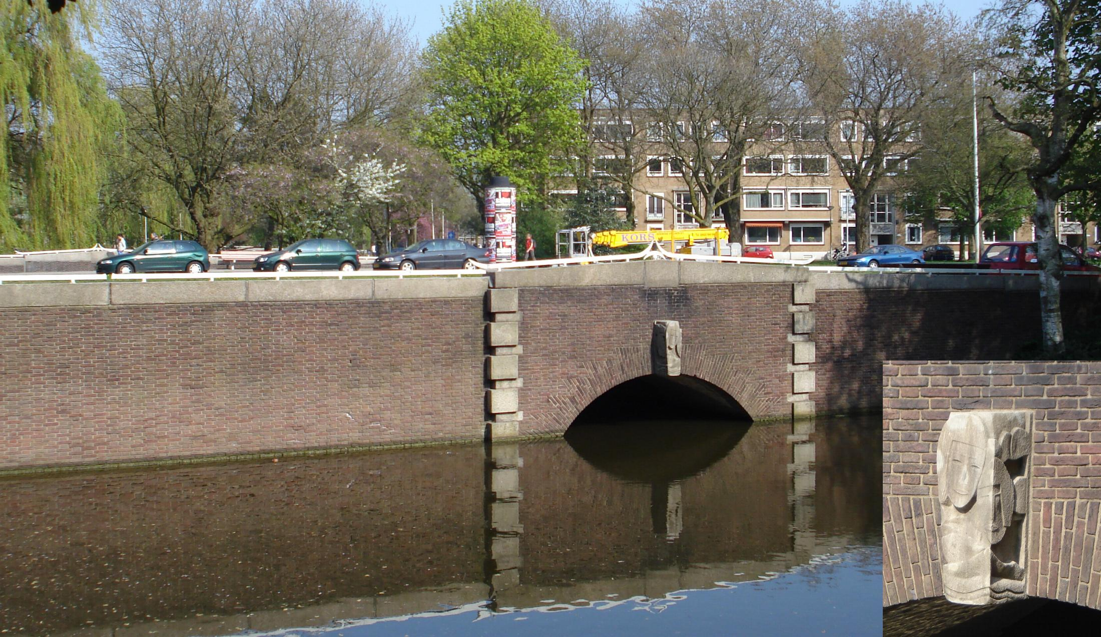 Rotterdam, Blijdorp. Statenbrug. Gemeentemonument.